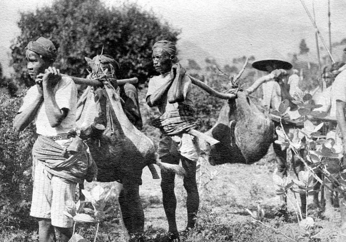 Repronegatief. De jachtbuit, Bima.